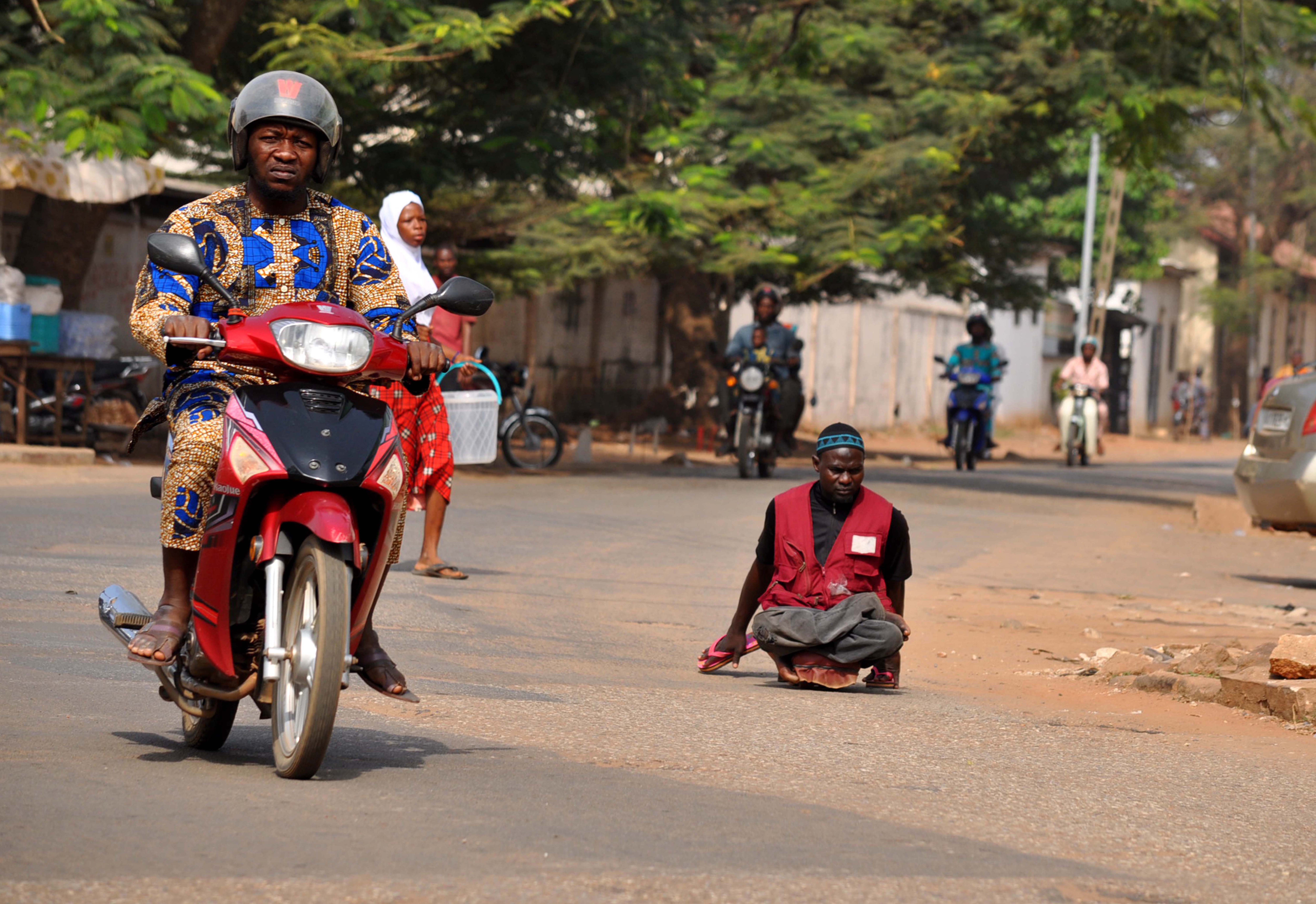 like all others this handicapped person is going to conquer his livelihood This is an image with the theme "Africa on the Move or Transport" from: Benin